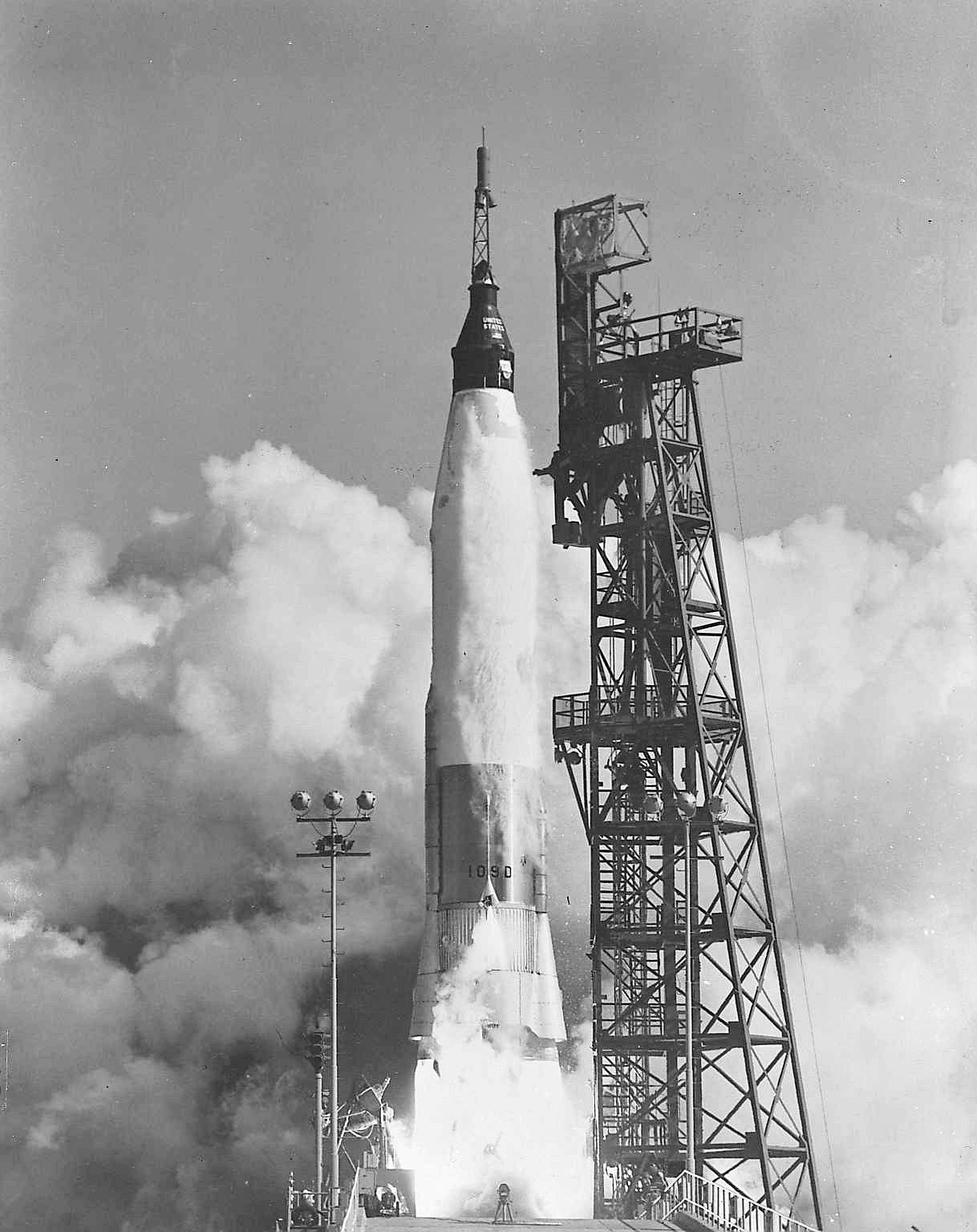 Start vun MA-6 mam John Glenn (Mercury-Programm).